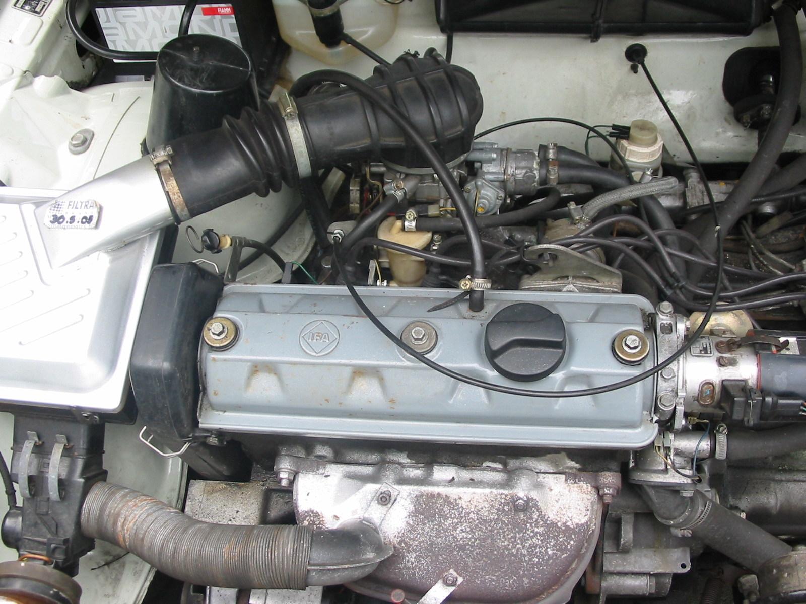 Motorraum eines Wartburg 1.3: Man sieht die Enge, der Motor musste in das Fahrzeug.